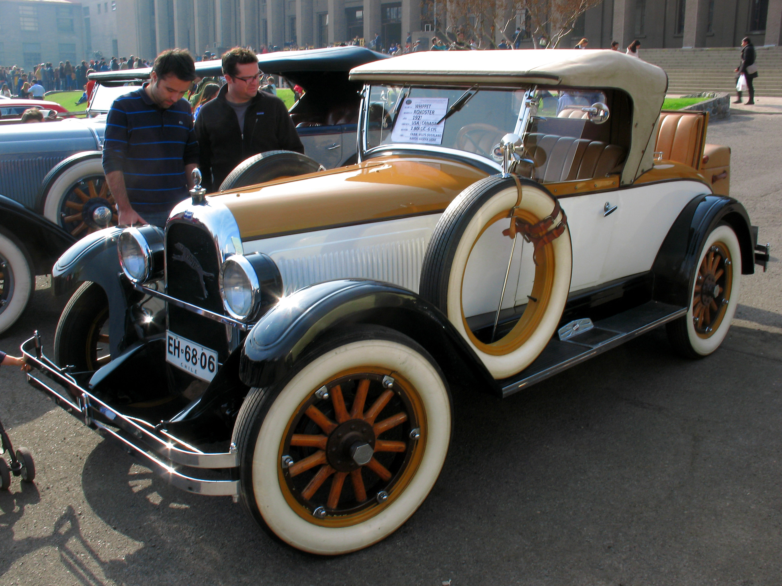 Whippet Model 96 Roadster 1927